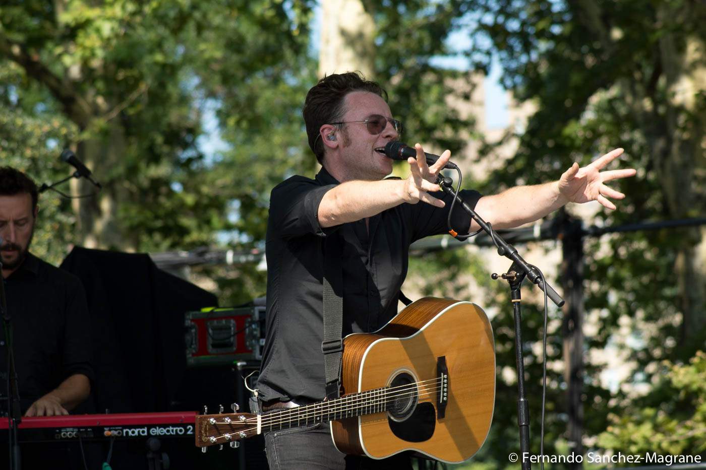 Mishima, 2014. Catalan Sounds @ Central Park NYC